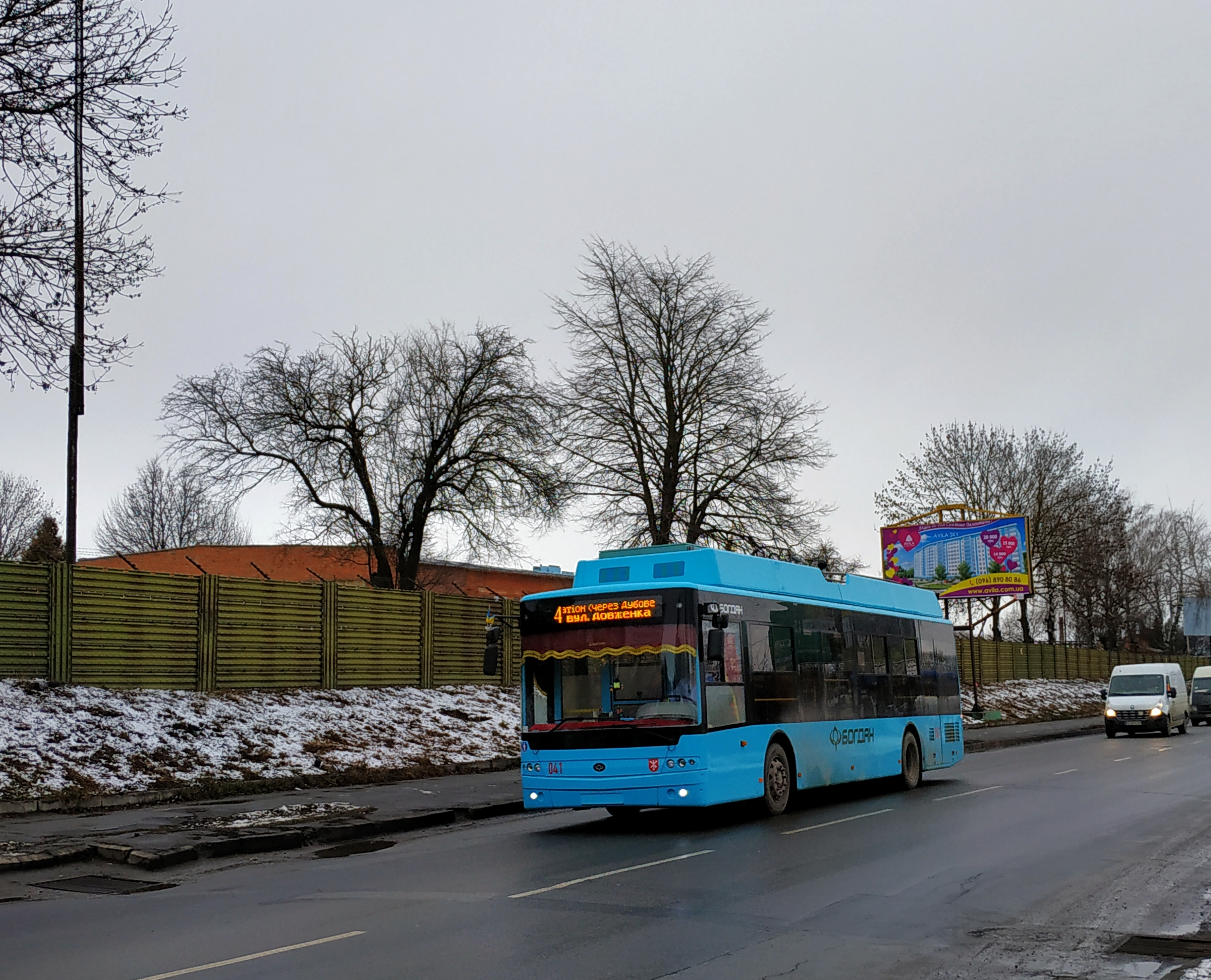 тролейбус з автономним ходом Богдан Т70117 на вулиці Купріна